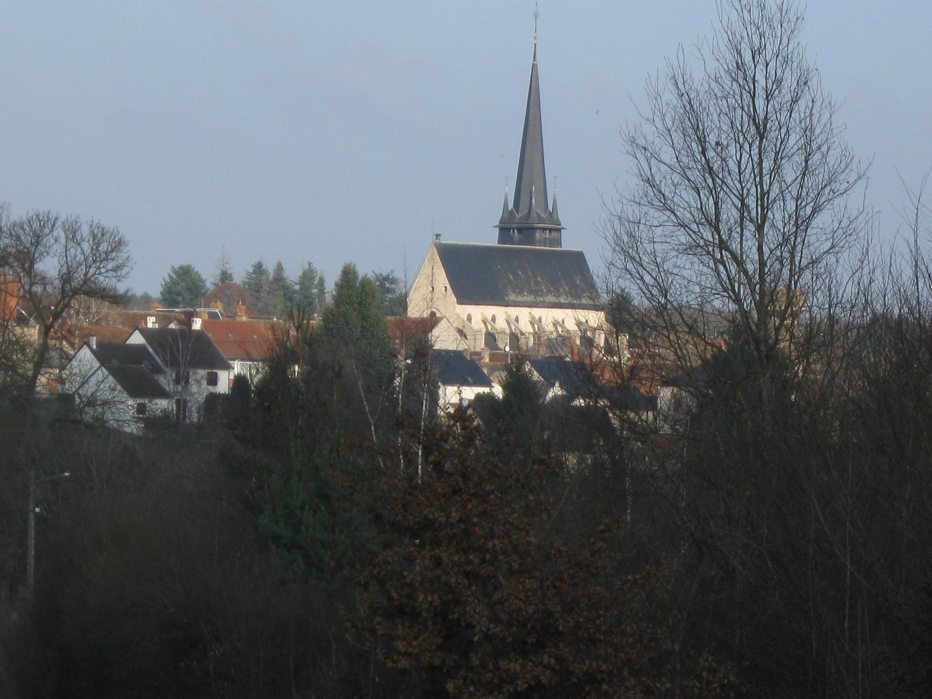 Ouzouer-sur-Trézée vue du sud.